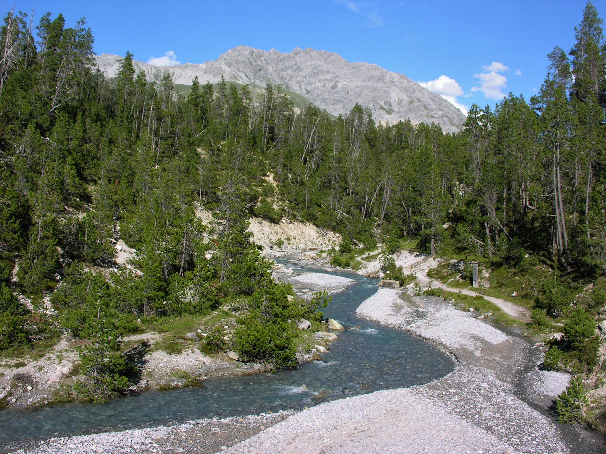 Switzerland, Graubünden, Swiss National Park